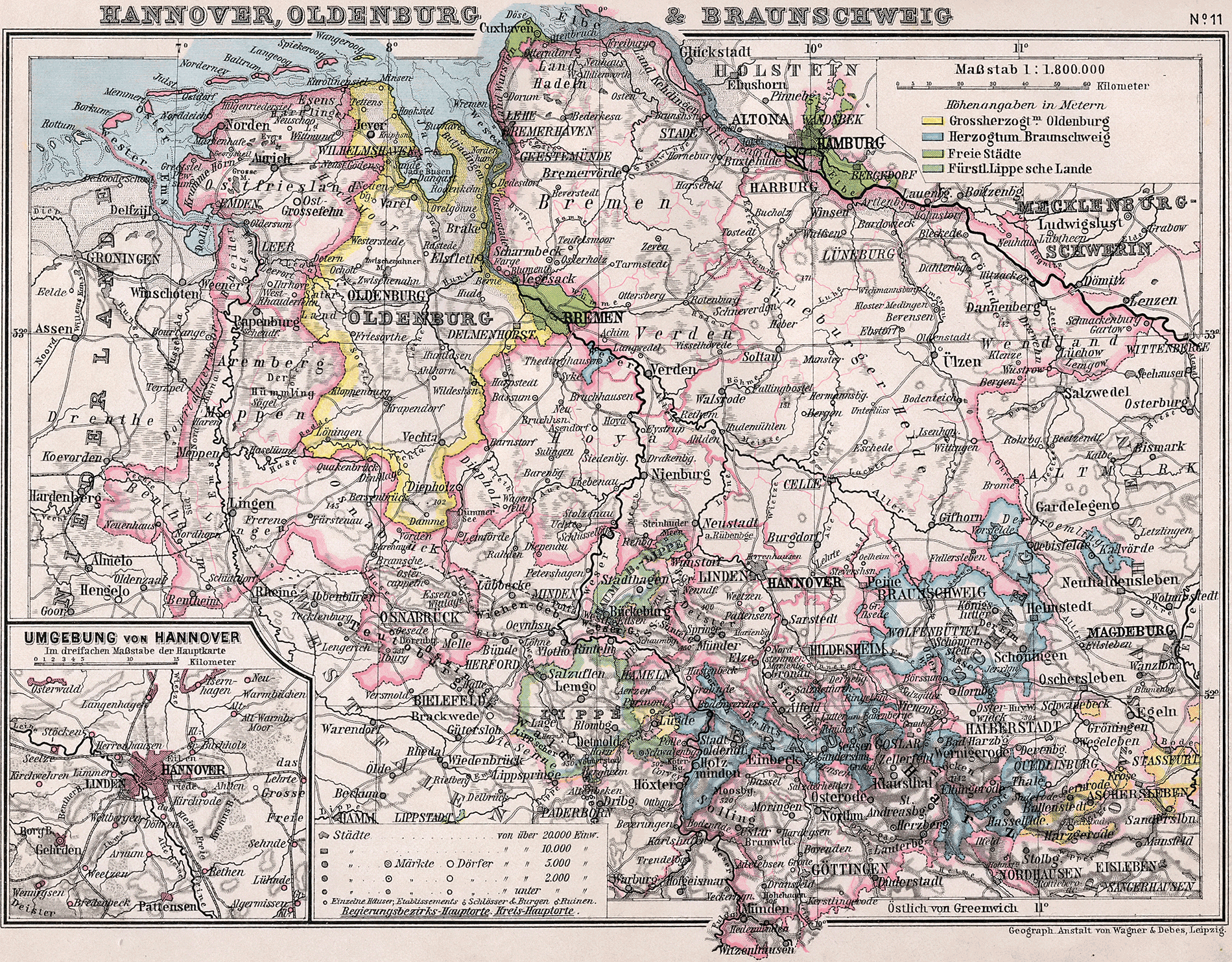 Historical map of Hannover, Oldenburg, Braunschweig